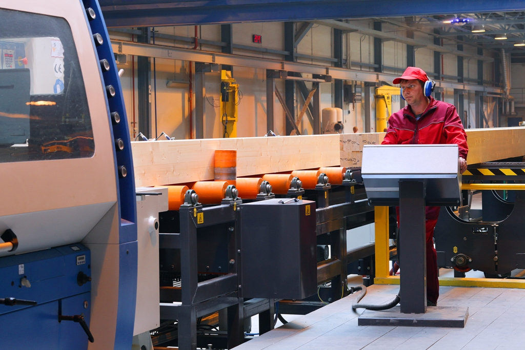 Профилирующий станок, профилирование клееного бруса. Сокольский ДОК, Россия